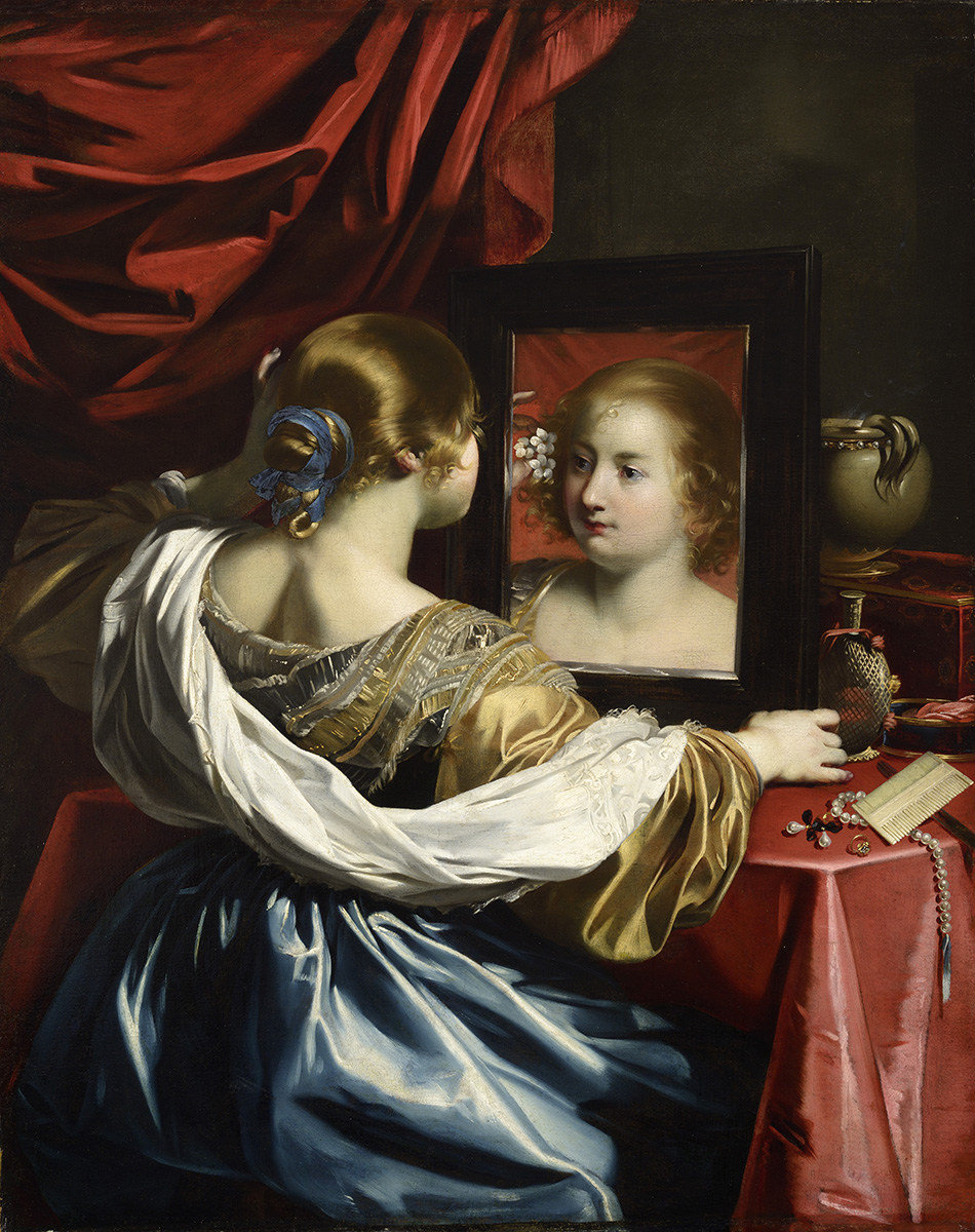 Vanité